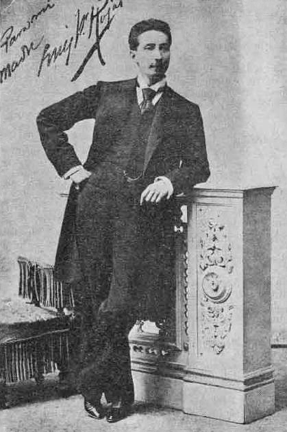 Luis Fernando Rojas (1857-1942) Ilustrador de la sociedad chilena.